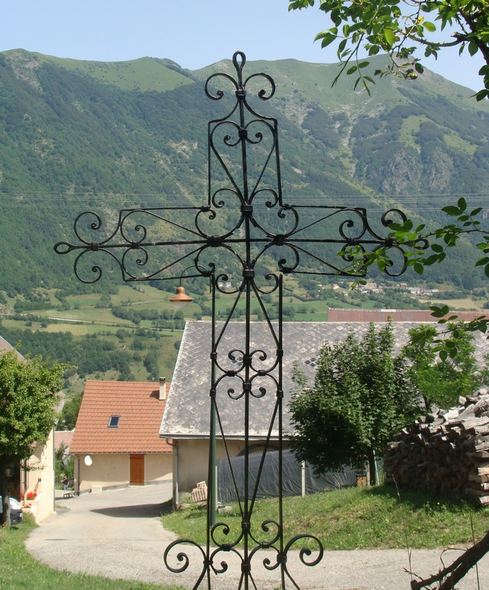 Croix en fer forgé en haut du village de Beaufin.